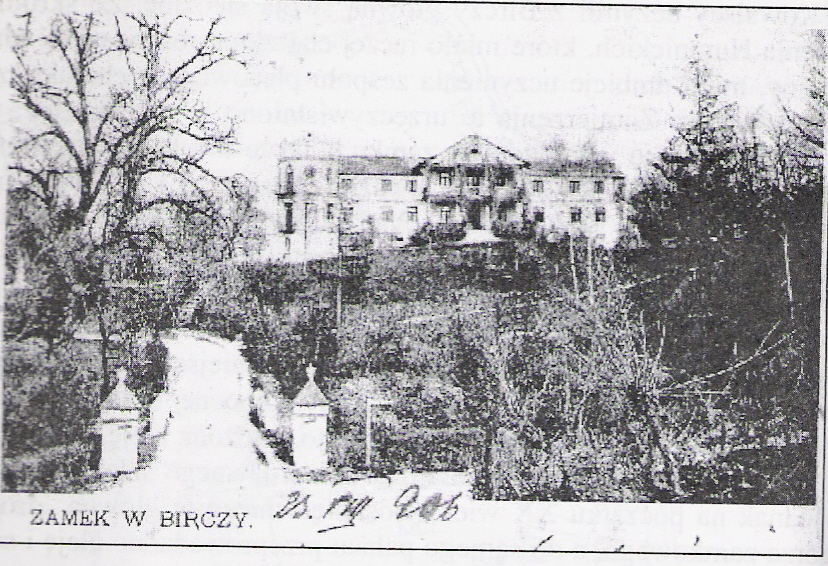 Postcard from Bircza, 1906, Bircza Castle